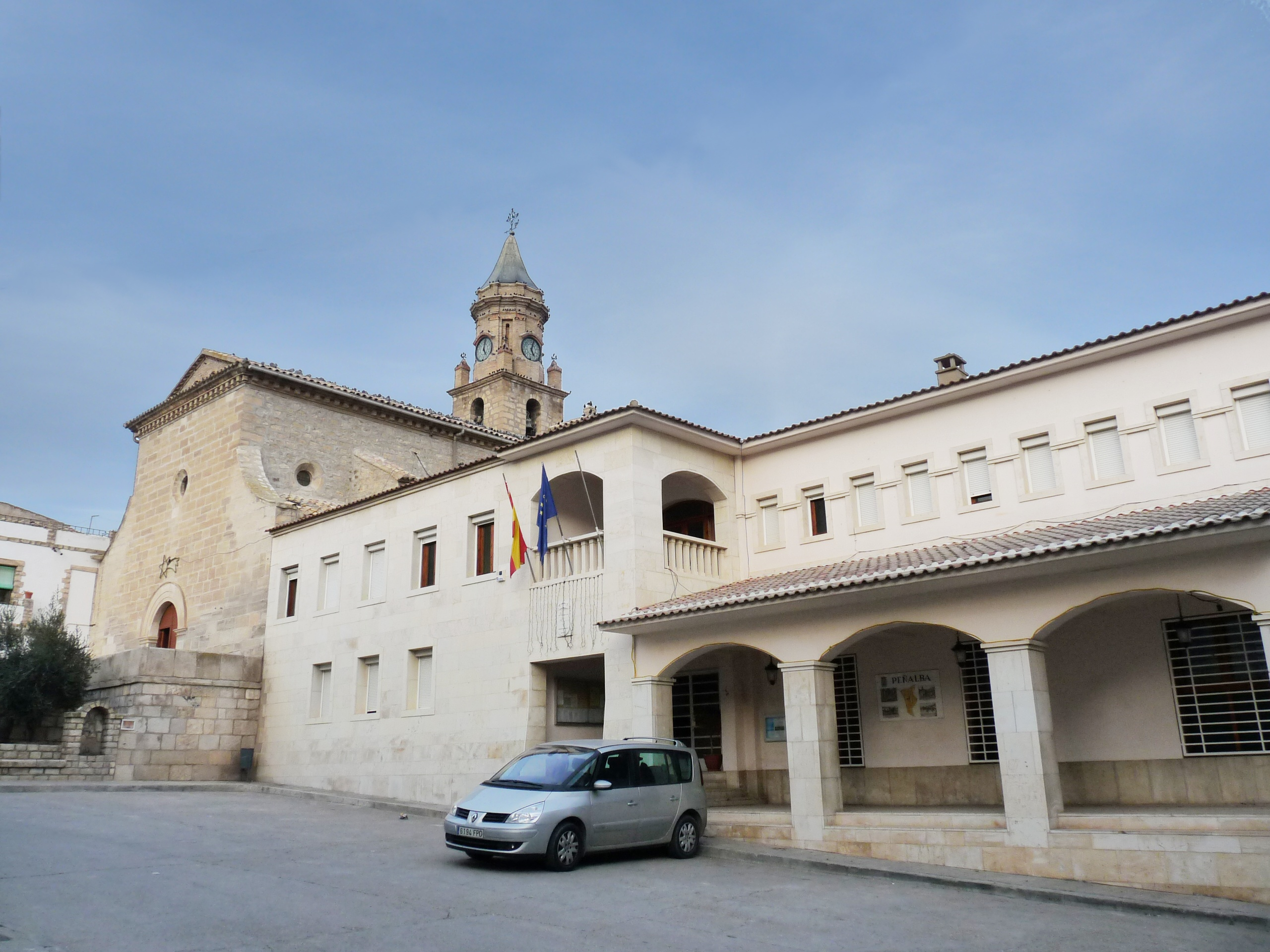 Peñalba - Iglesia de la Santa Cruz (s. XVII) (izq.) y Ayuntamiento (dcha.)